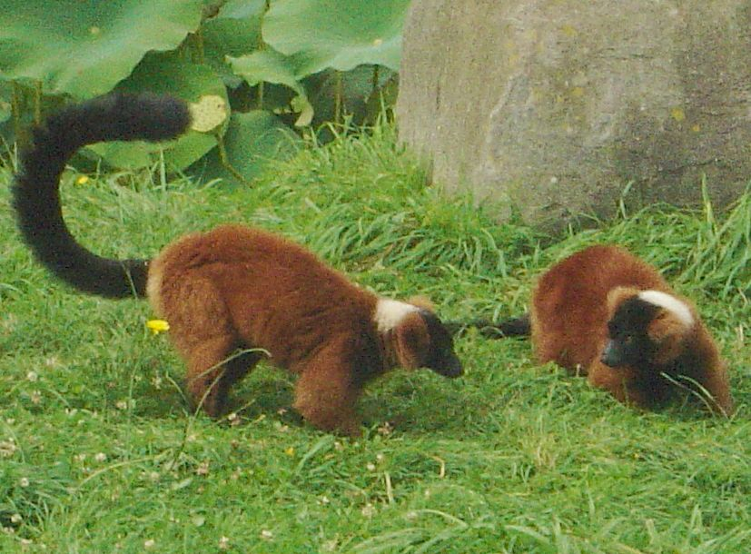 Maki vari roux, au parc zoologique de la Bourbansais.